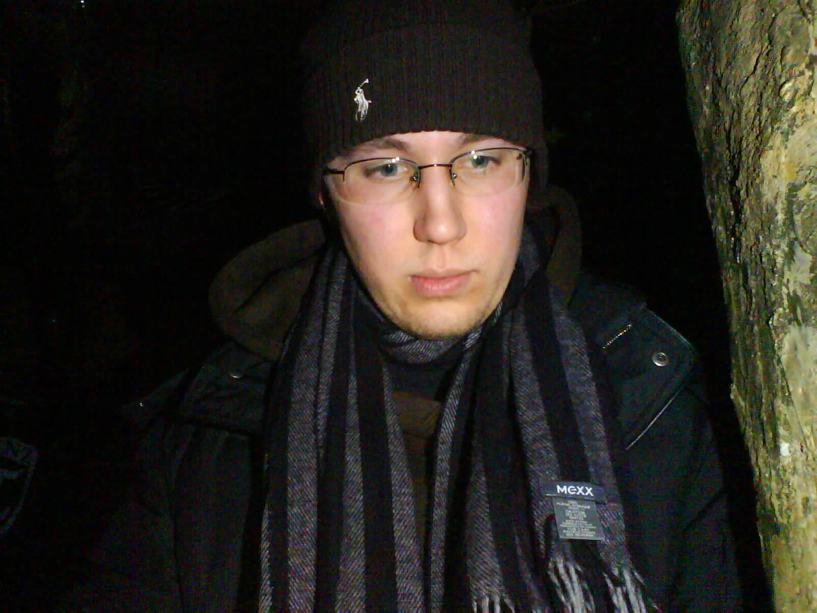 Prinz Pi nach einem Konzert in Bremen, Februar 2007